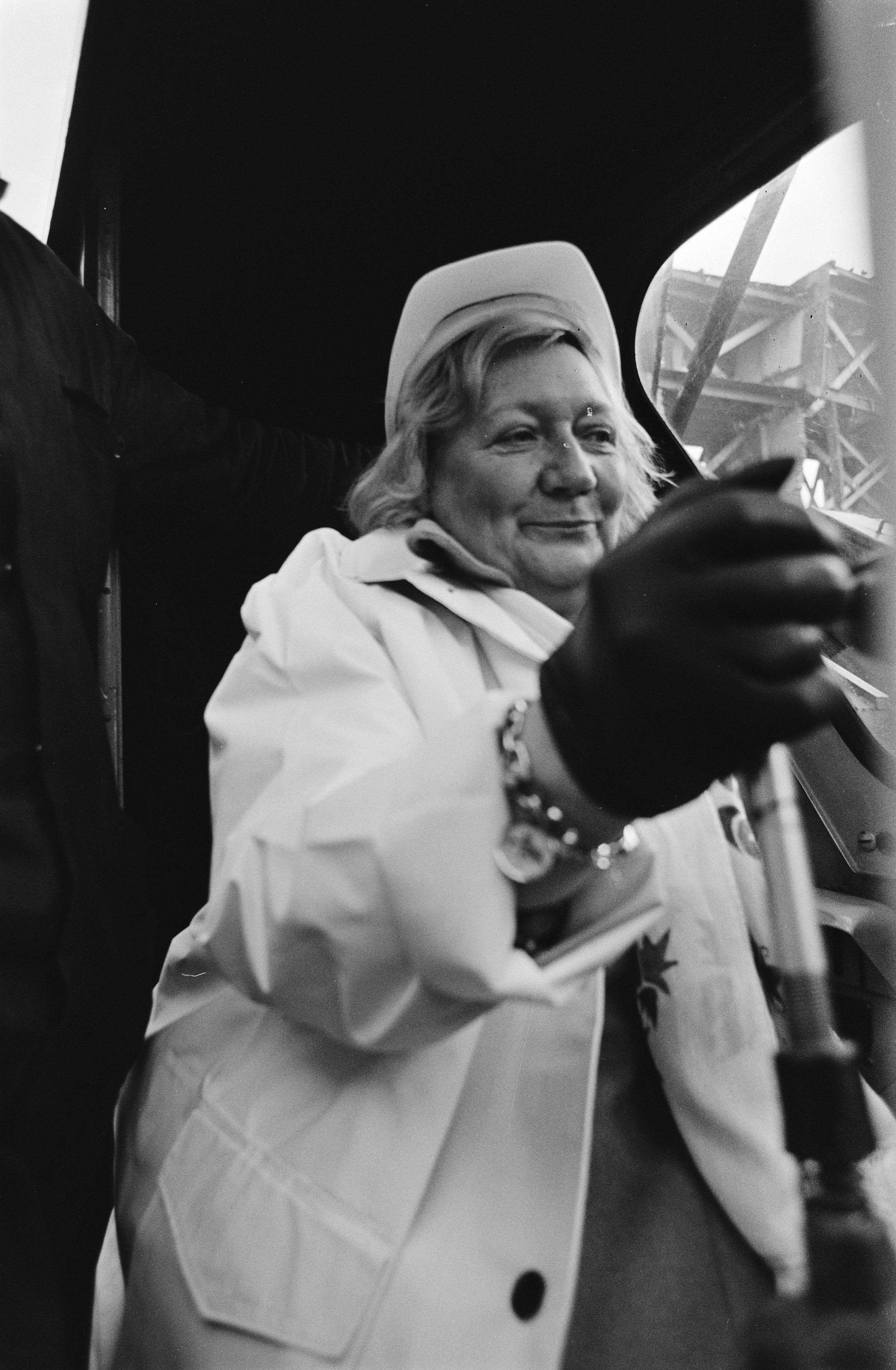 Collectie / Archief : Fotocollectie Anefo Reportage / Serie : [ onbekend ] Beschrijving : Belgische min. van Ned. cultuur en Vlaamse aangelegenheden, Rika de Bacher van Ocken slaat 1e paal Belgisch Centrum voor Ned. cultuur aan de Nes / Datum : 13 november 1978 Trefwoorden : centra, culturen, ministers Persoonsnaam : R. de Bacher van Ocken Fotograaf : Dijk, Hans van / Anefo Auteursrechthebbende : Nationaal Archief Materiaalsoort : Negatief (zwart/wit) Nummer archiefinventaris : bekijk toegang 2.24.01.05 Bestanddeelnummer : 929-9930